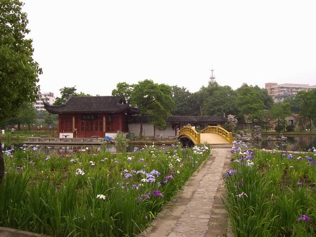 莫愁湖公園 2004年5月29日撮影 撮影者：権作 参照：